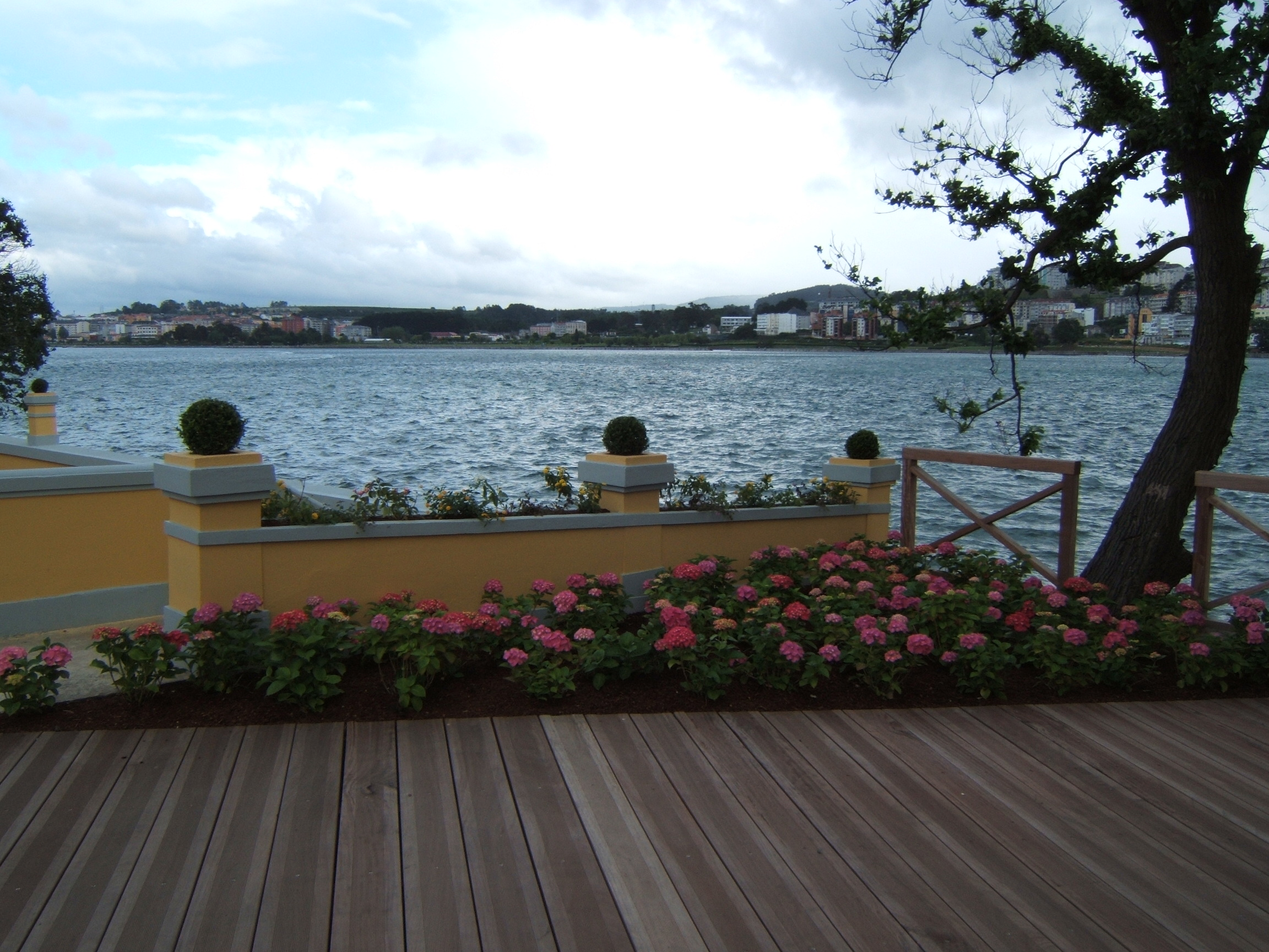 Ría de O Burgo